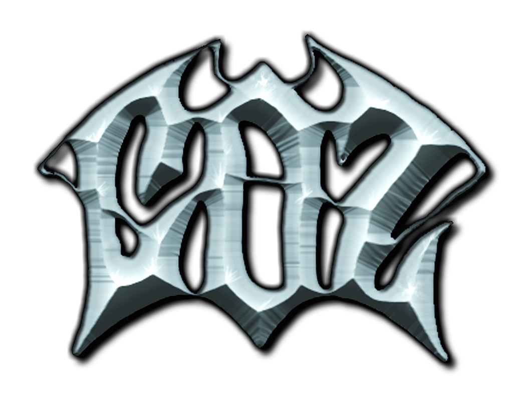 Logo del grupo español de Rock Coz